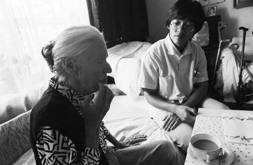 Altenpflege durchgeführt von einem Zivildienstleistenden in München